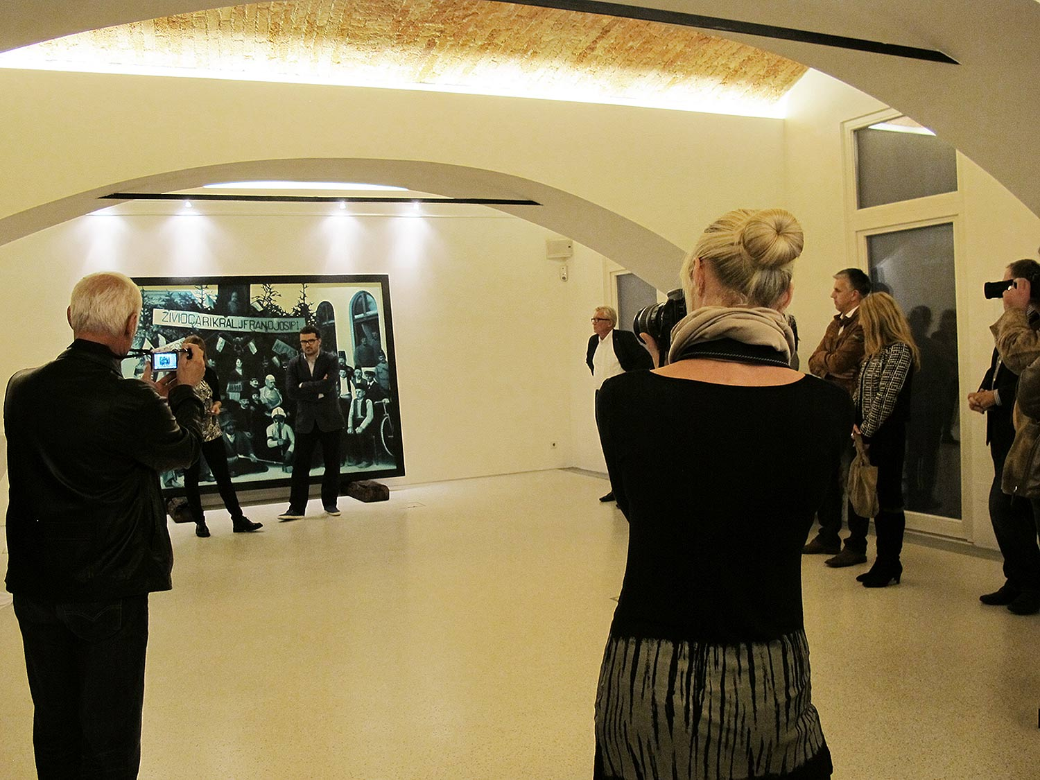 Gleisdorfer Kunstsymposion 2014 (Ausstellung des bosnischen Künstlers Radenko Milak, geb. 1980 )